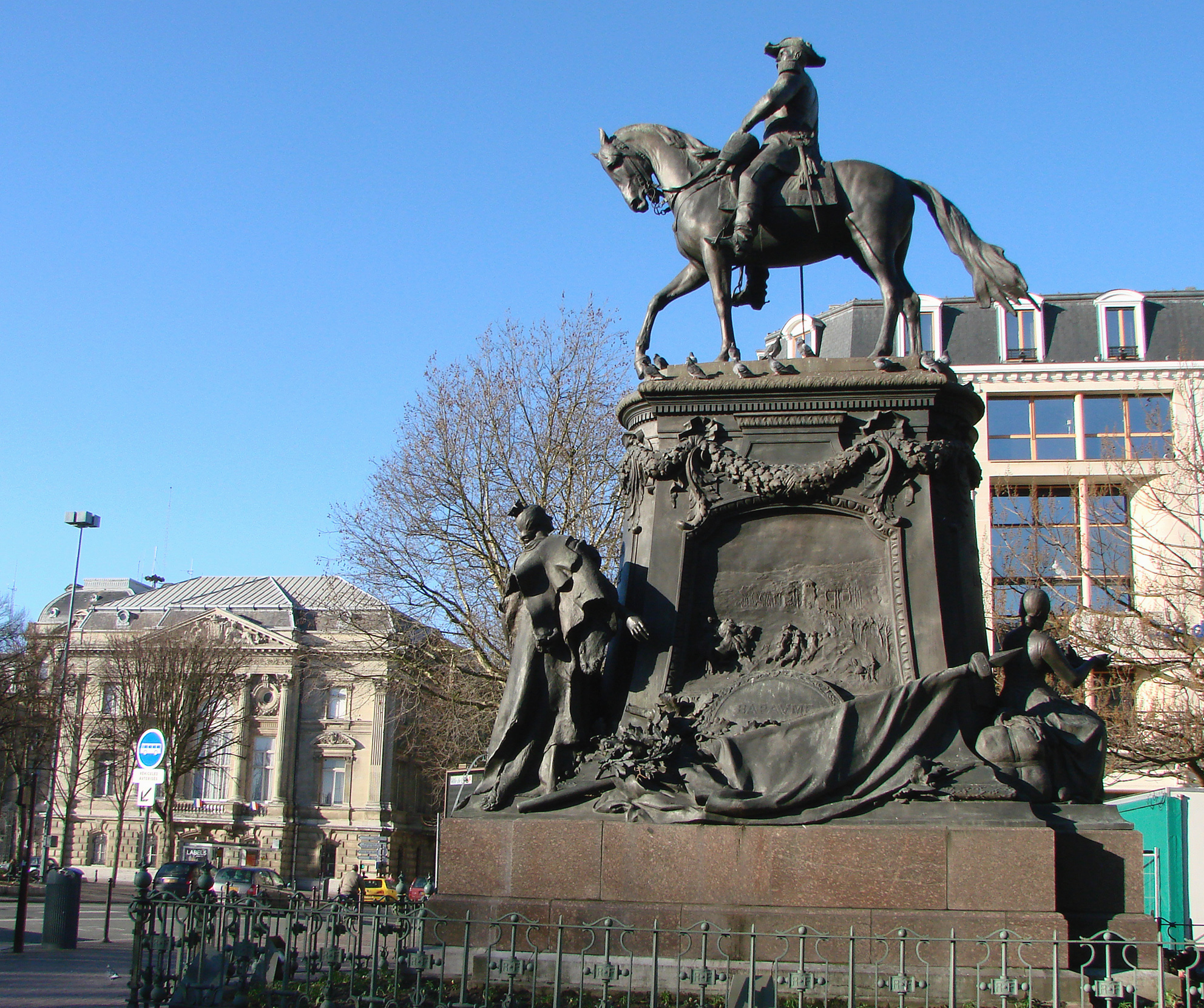 Monument au Général Faidherbe (Lille 3/06/1818-Paris 28/09/1889), place Richebé à Lille. Sculpteur: Antonin Mercié (1845-1916).